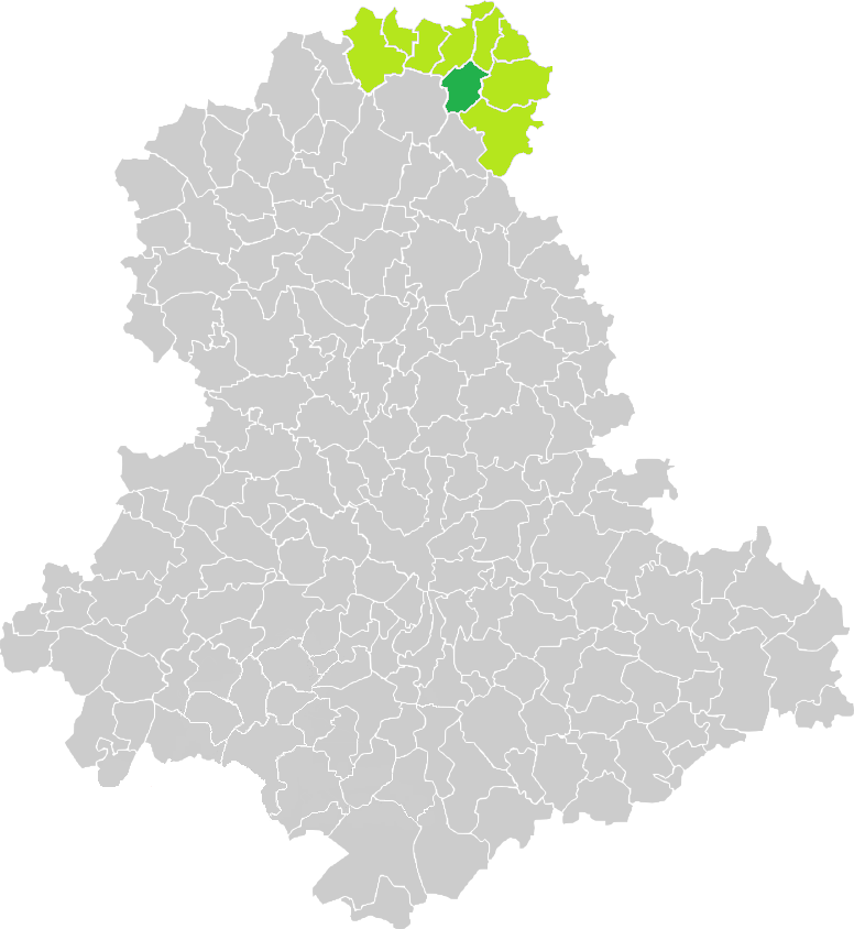 Carte de situation de la commune de Mailhac-sur-Benaize (en vert foncé) dans le votre Canton (en vert clair) sur une carte des communes de la Haute-Vienne